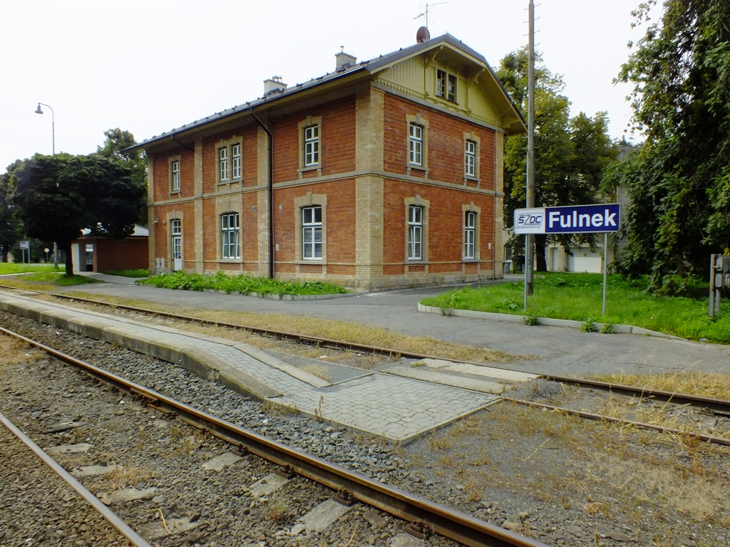 Staniční budova